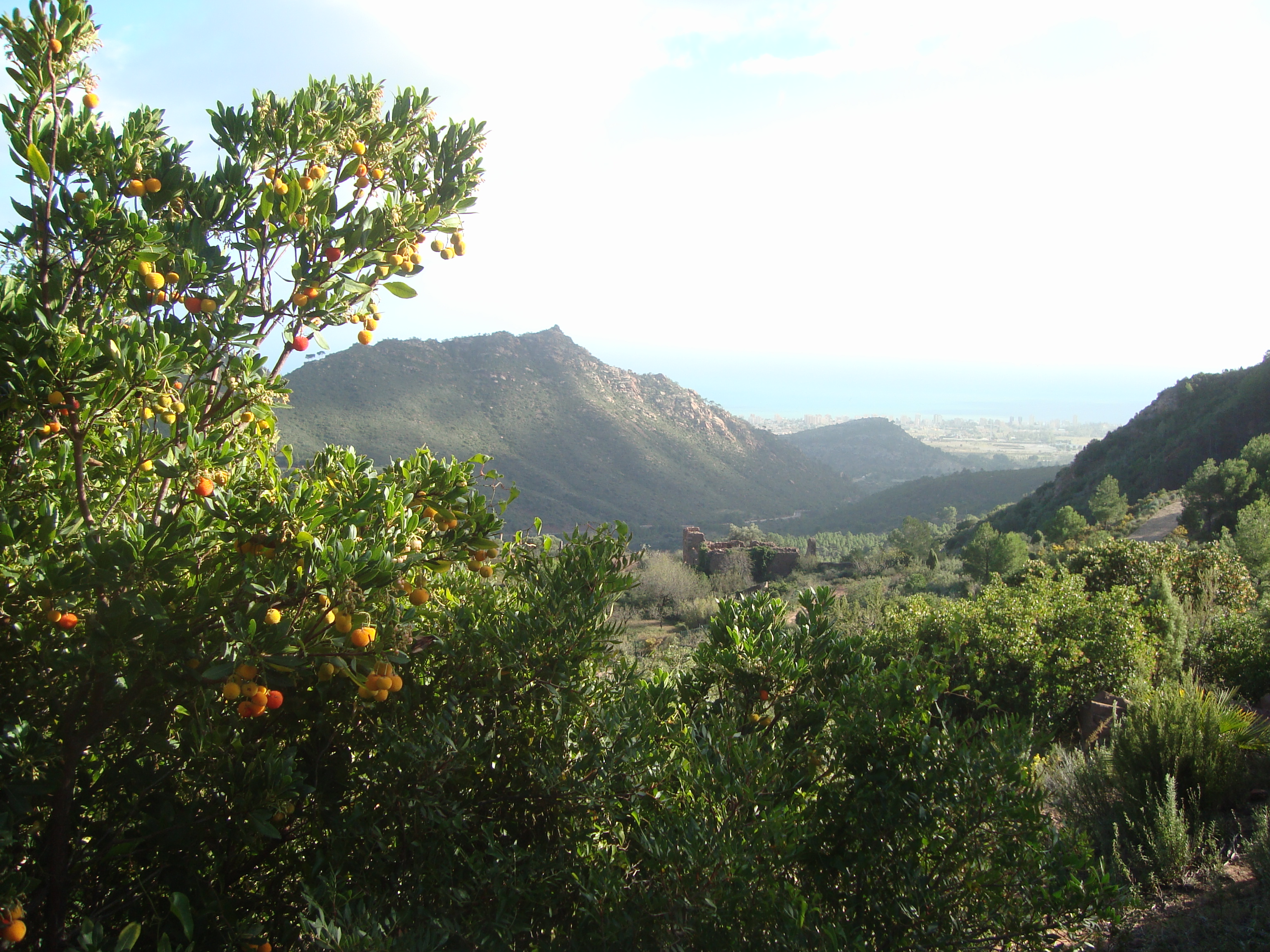 Madroño, Wüste von Las Palmas